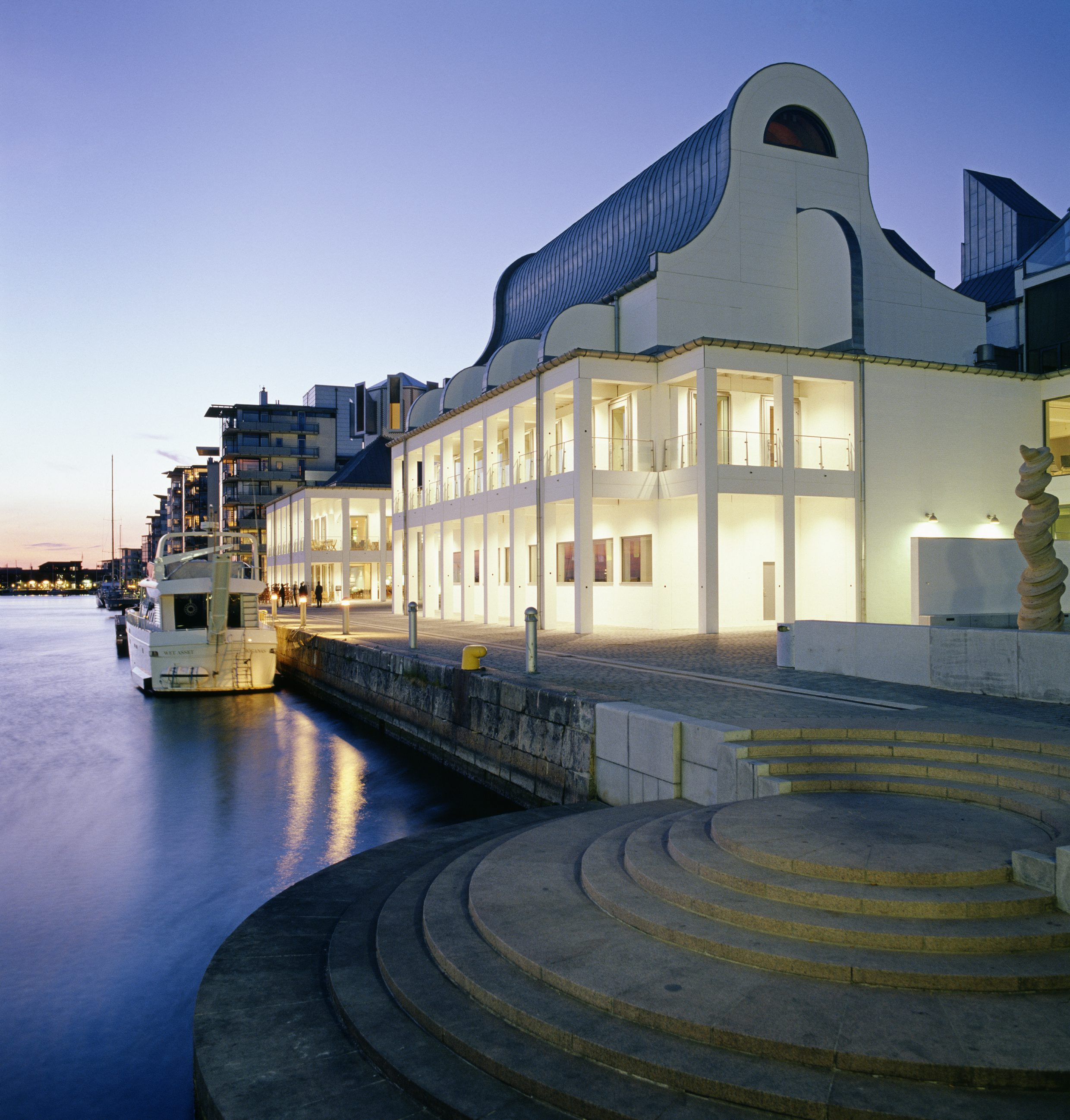 Fotografi av Dunkers Kulturhus från havssidan i skymningen. I förgrunden syns den runda trappan där det ekar om man talar. Dunkers Kulturhus är ritat av den danske arkitekten Kim Utzon och invigdes år 2002. Målet är att gynna kunskapen inom kulturarv, konst, musik, drama och andra konstformer. Dunkers Kulturhus har fått sitt namn efter Henry Dunker . Vid sin bortgång efterlämnade han sig en fond som skulle gå till kulturella investeringar i Helsingborg. Dunkers Kulturhus byggdes med hjälp av donationen.